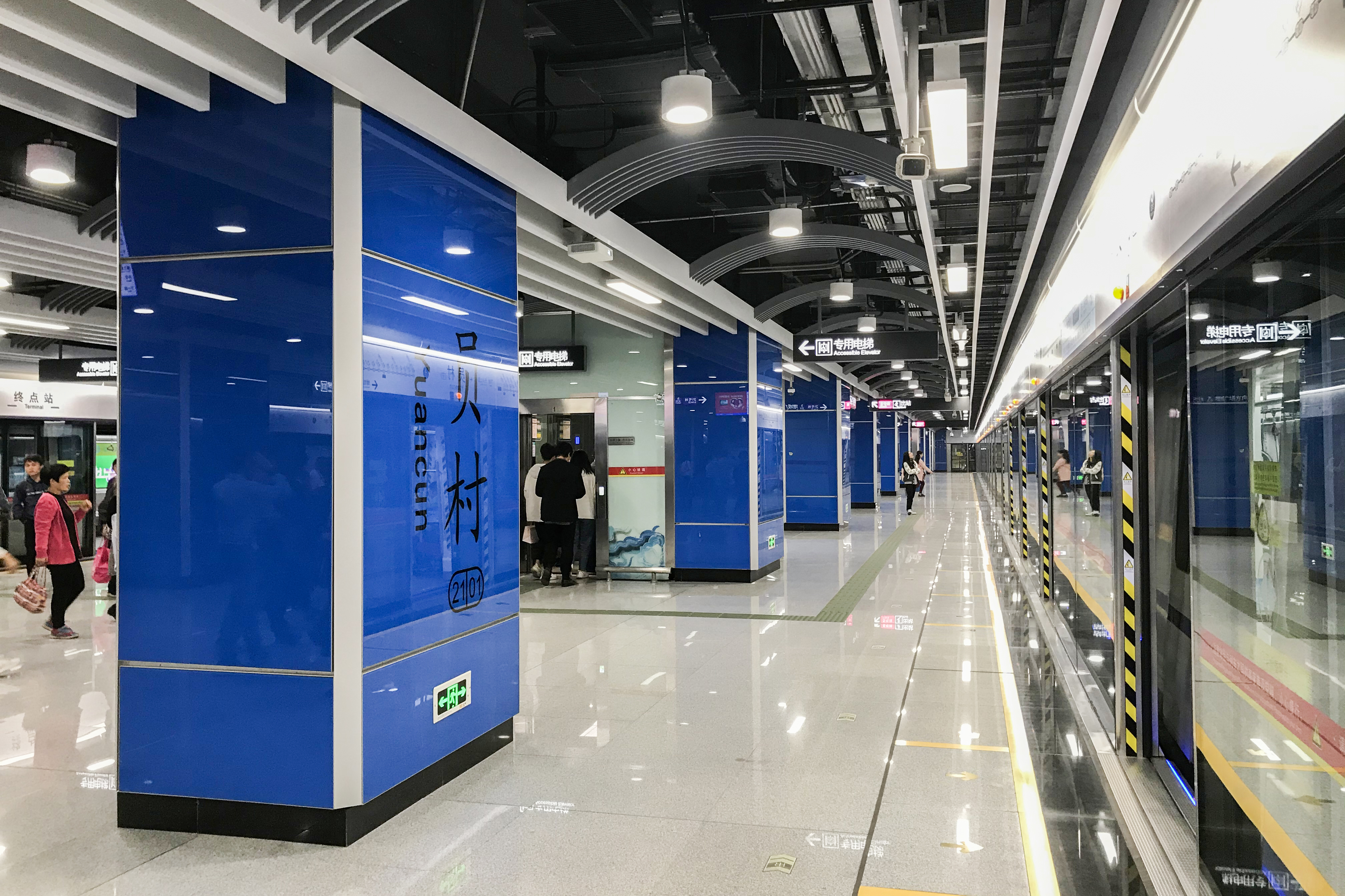 广州地铁员村站